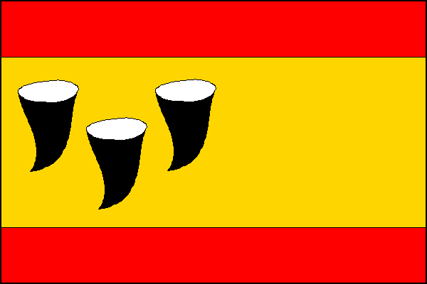 vlajka, Měřín, okres Žďár nad Sázavou